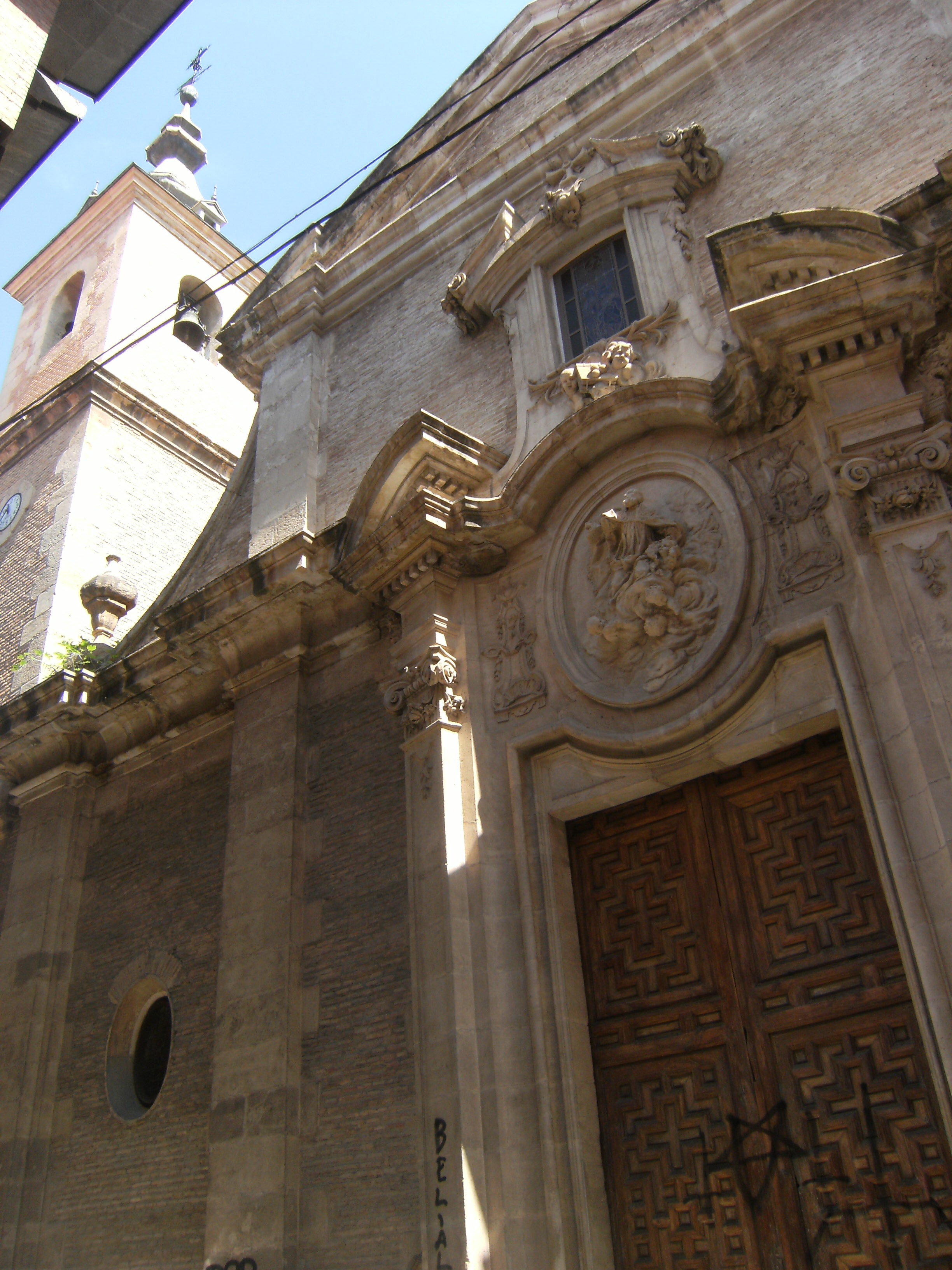 Fachada y torre de la iglesia barroca de San Nicolás de Murcia (Región de Murcia, España)